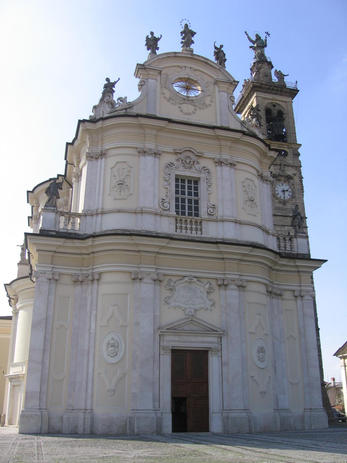 Calcinate, Bergamo, Italia